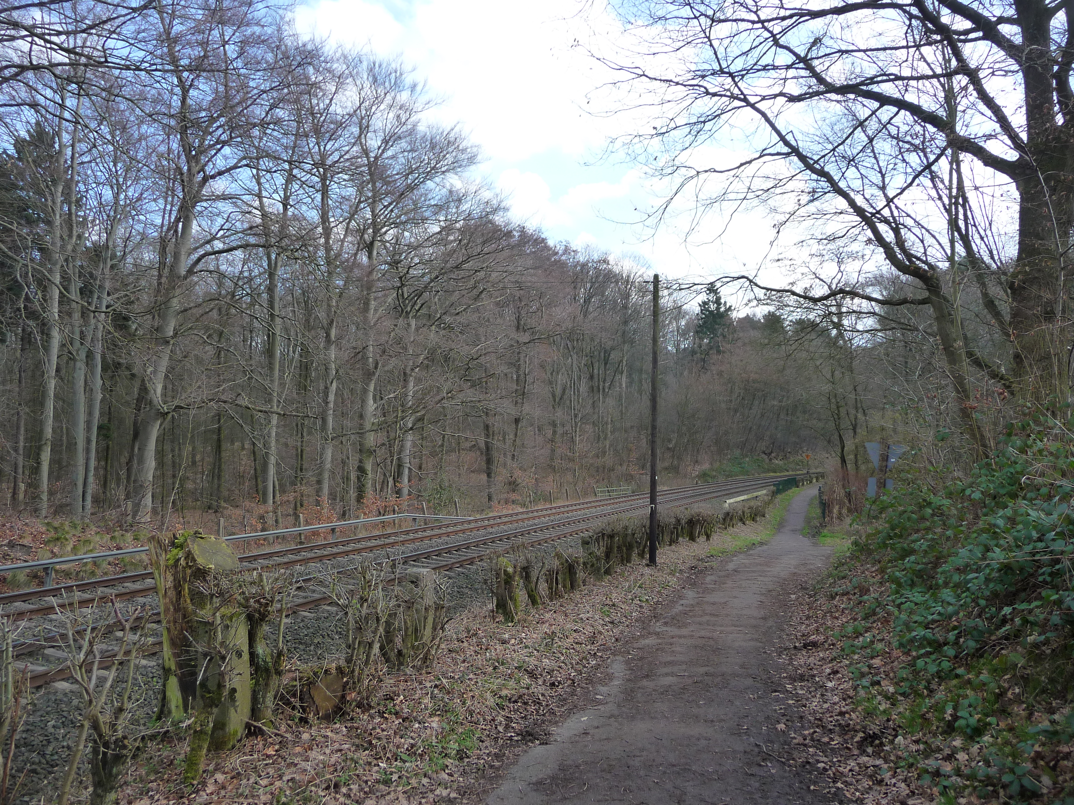 Eisenbahnstrecke Dortmund–Schwerte (Ardeybahn) im Westen des Naturschutzgebiets Aplerbecker Wald